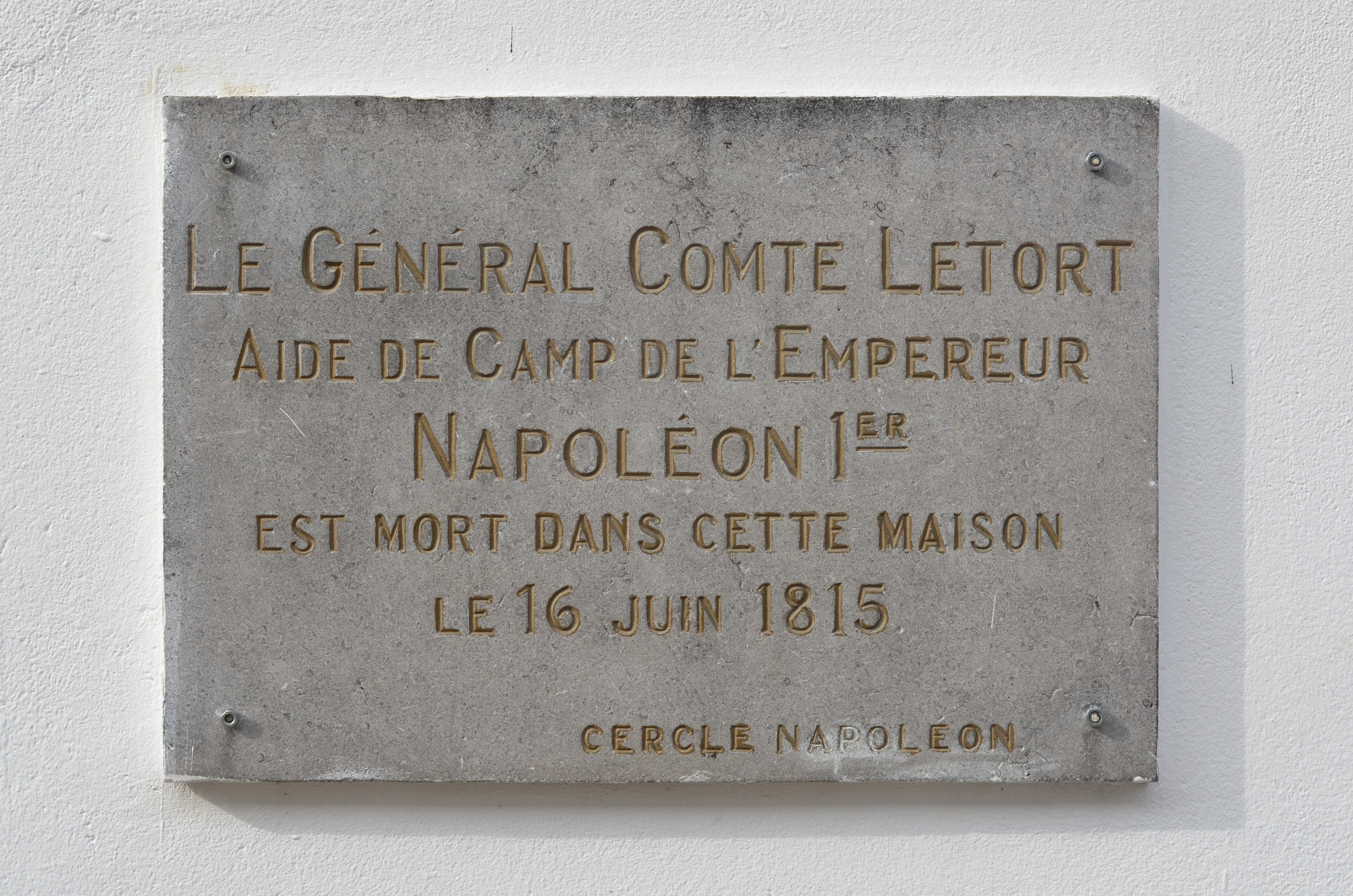 Plaque apposée à Charleroi (Belgique), 88 boulevard Joseph Tirou. Texte : "Le Général Comte Letort aide de camp de l'Empereur Napoléon 1er est mort dans cette maison le 16 juin 1815. Cercle Napoléon"